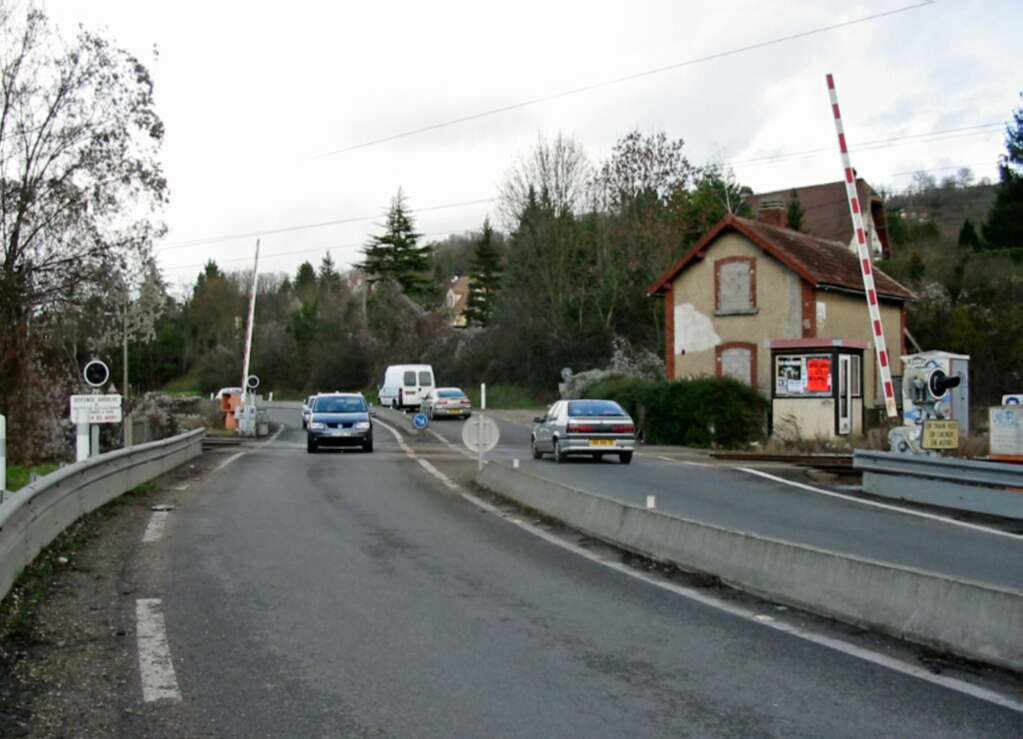 Passage à niveau automatique à Maule (Yvelines) Photo JH Mora ; janvier 2005